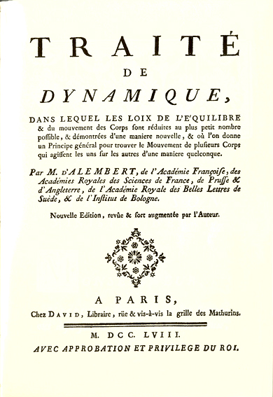 Traité de dynamique - Jean le Rond d'Alembert